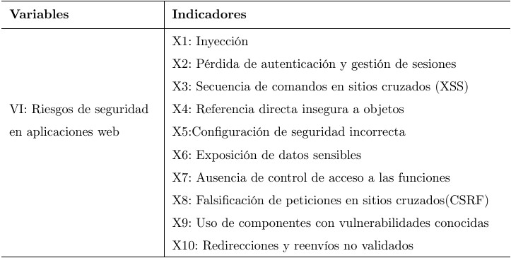 Owasp Top 10